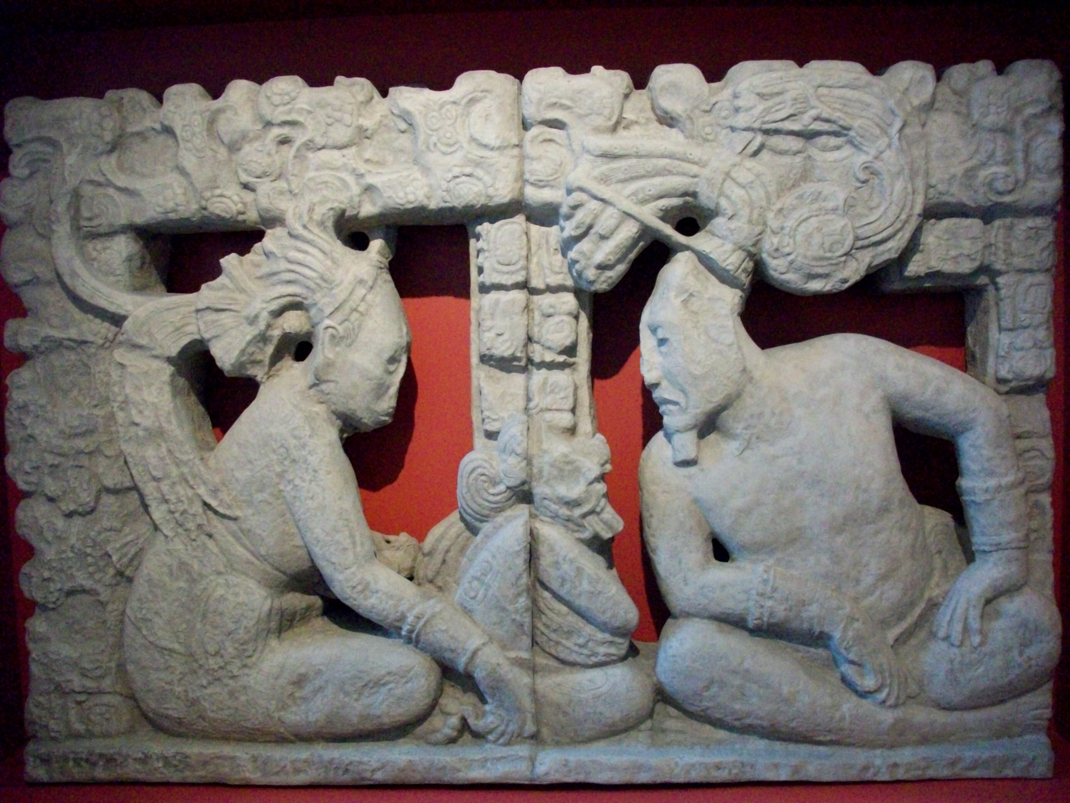 Representación Ixchel (izquierda) e Itzamná (derecha) en la Montaña Sagrada previo a la creación del mundo. Copia de un respaldo de trono labrado en piedra caliza. Cuenca del río Usumacinta, Chiapas. Clásico tardío. Museo Amparo, Puebla.